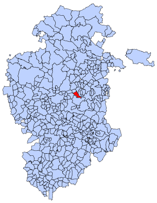 Barrios de Colina en Burgos